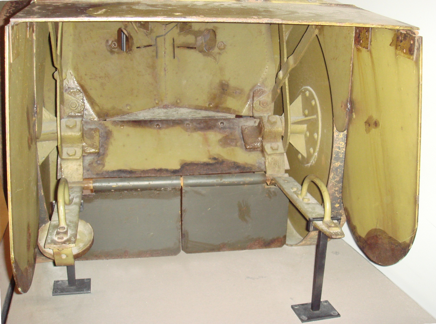 Mobile personnel shield interior, 1915, Hôtel national des Invalides, Musée de l'Armée, Paris, France.